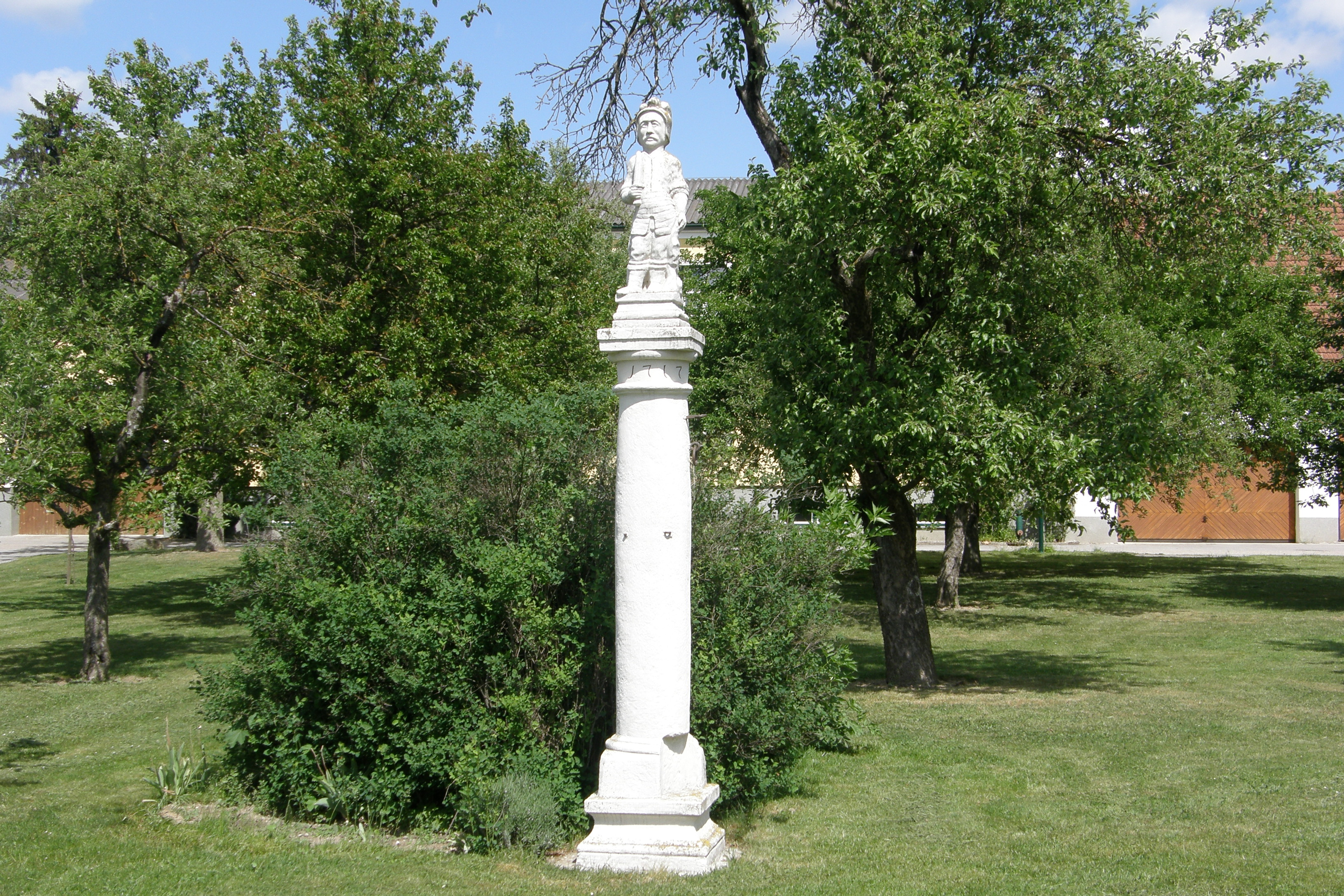 Pranger